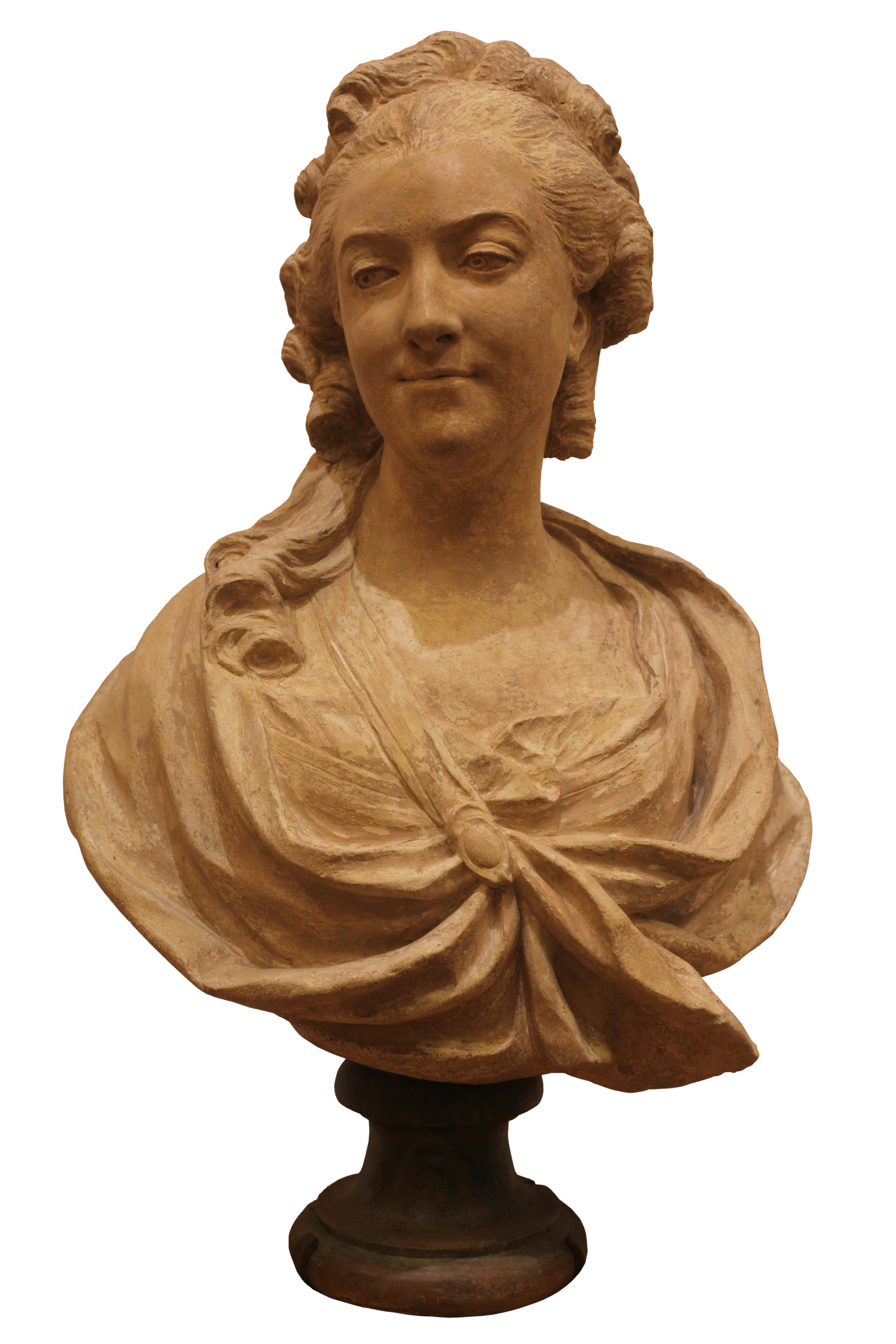 Portrait de Marie-Thérèse de Mondran (1723-1823), seconde épouse d'Alexandre Jean Joseph Le Riche de La Popelinière.